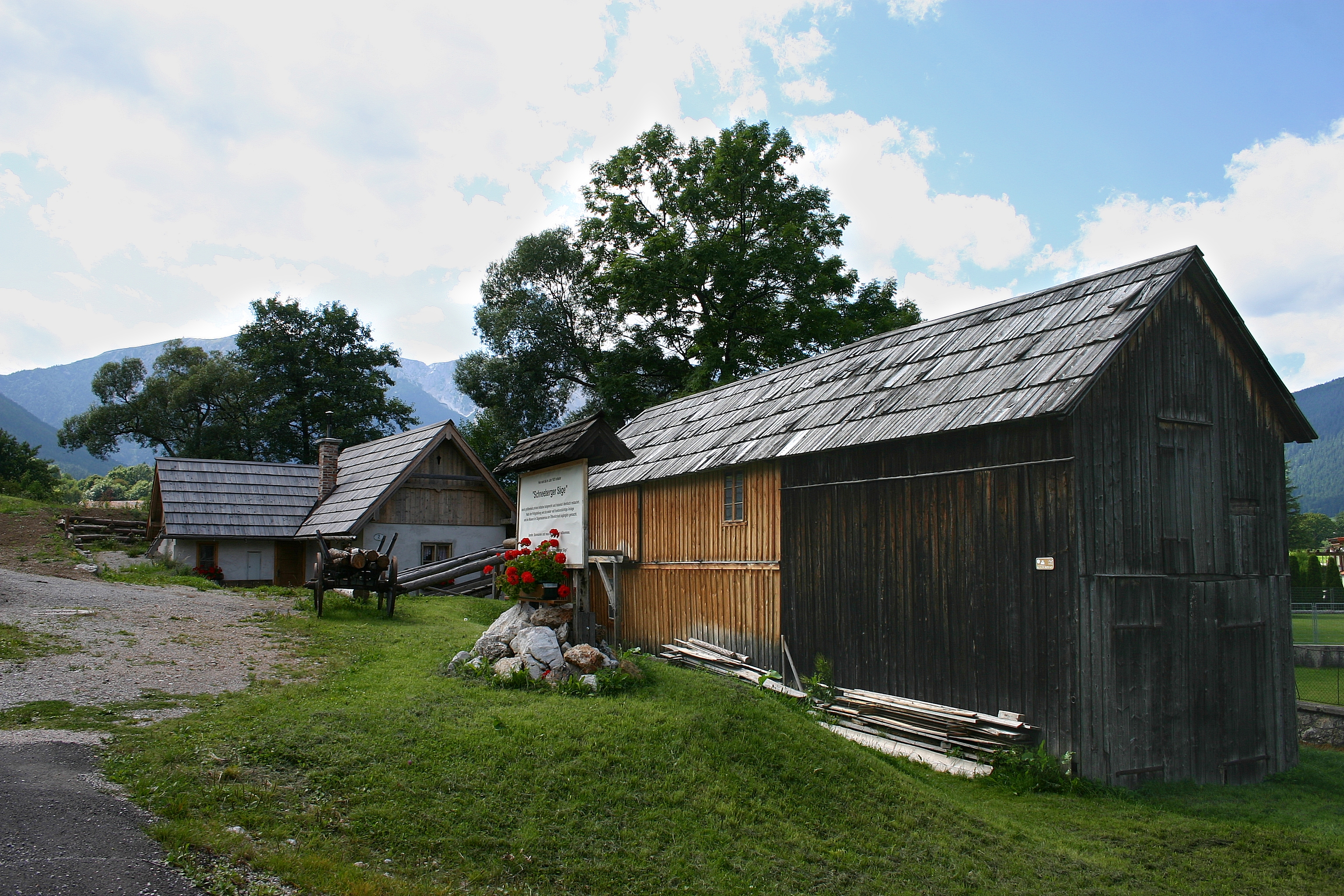 Puchberg am Schneeberg – Vorderansicht der Schneeberger Sägemühle